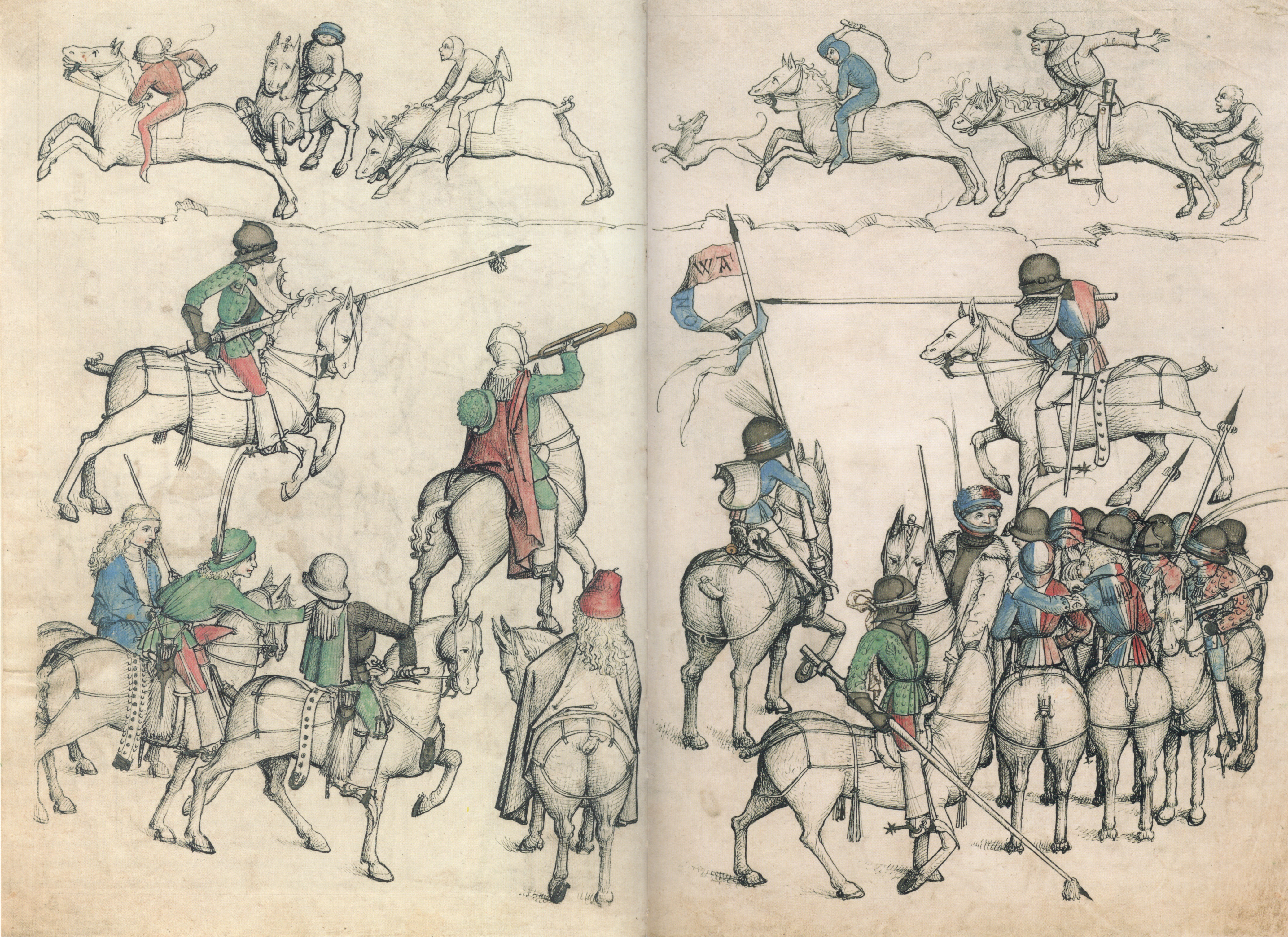 Mittelalterliches Hausbuch von Schloss Wolfegg Doppelseite fol. 21v–22r (Das Scharfrennen)